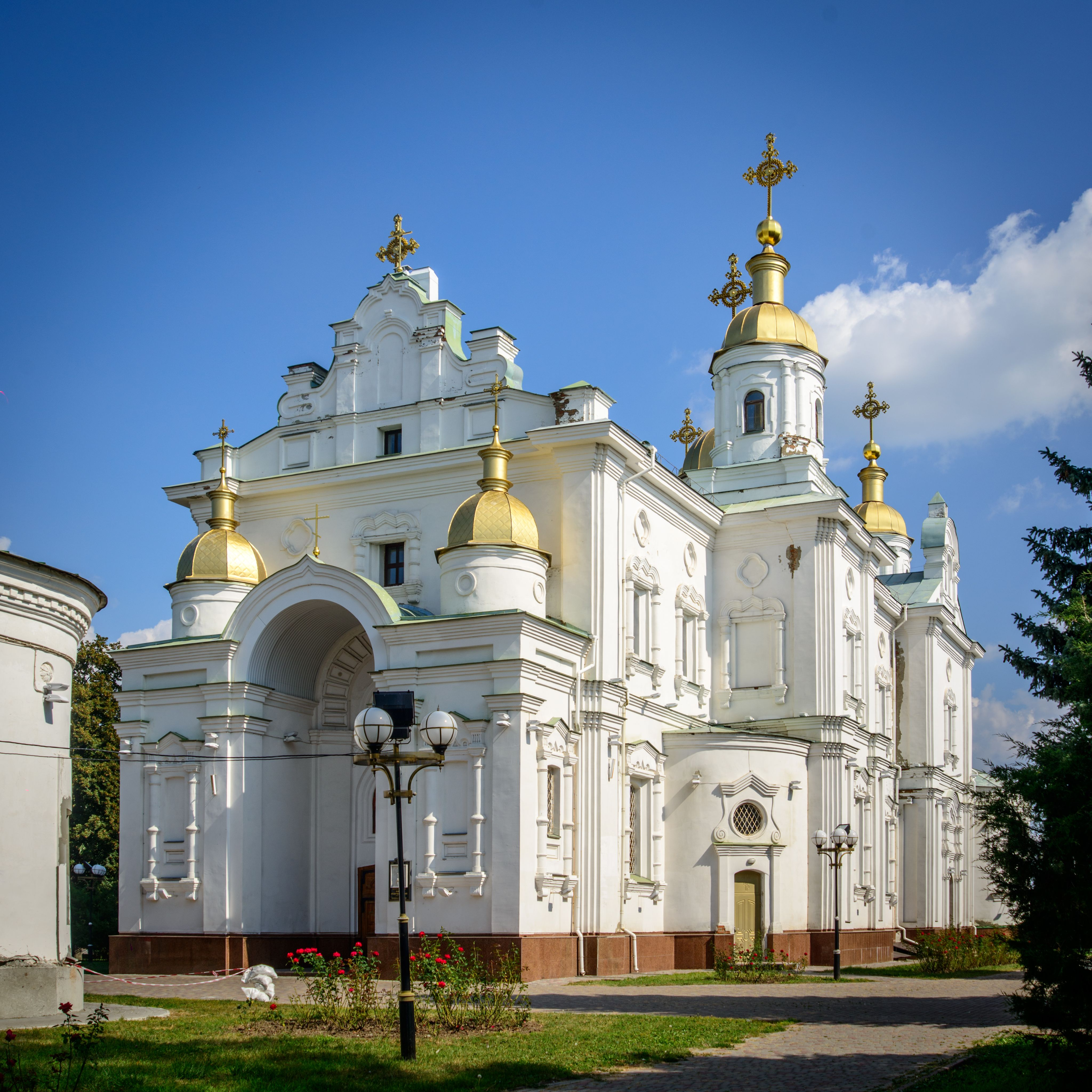 Успенський кафедральний собор, Полтава, Соборний майдан, 1